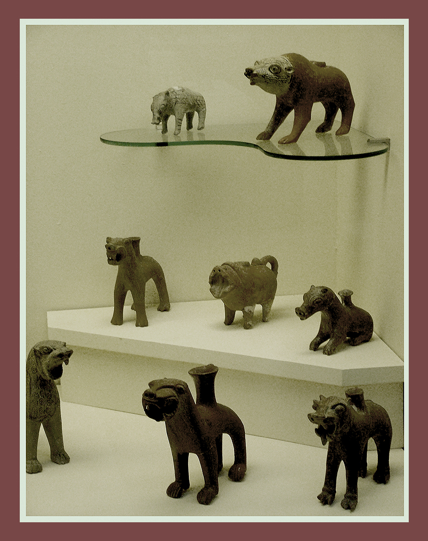 Kerámiafigurák (Anatóliai Civilizációk Múzeuma, Ankara)